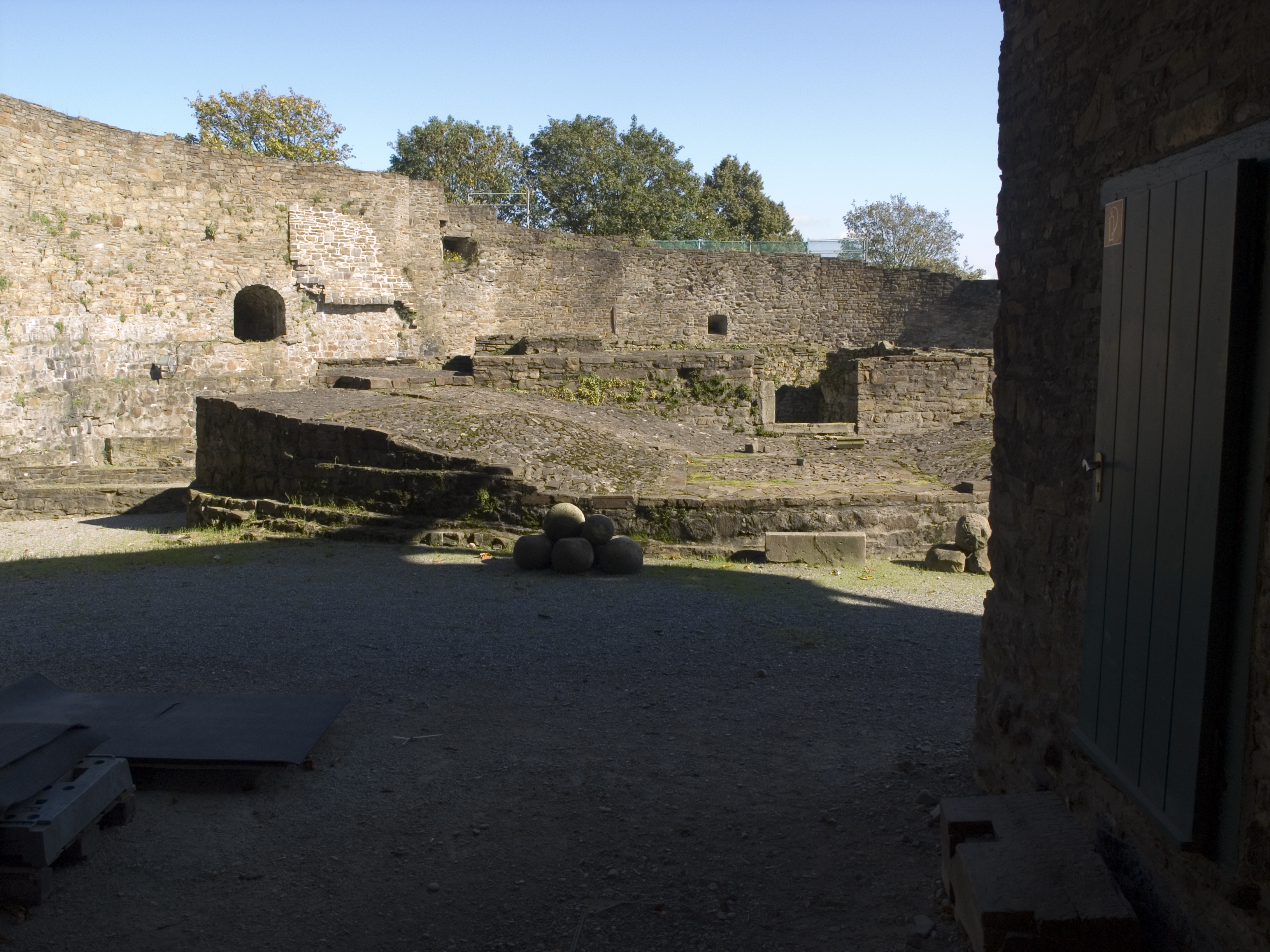 Северный Рейн-Вестфалия, Мюльхайм-на-Руре - замок Бройх